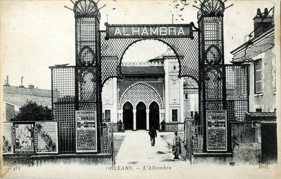 Ancien théâtre de l'Alhambra, boulevard Rocheplatte, Orléans, Loiret, France